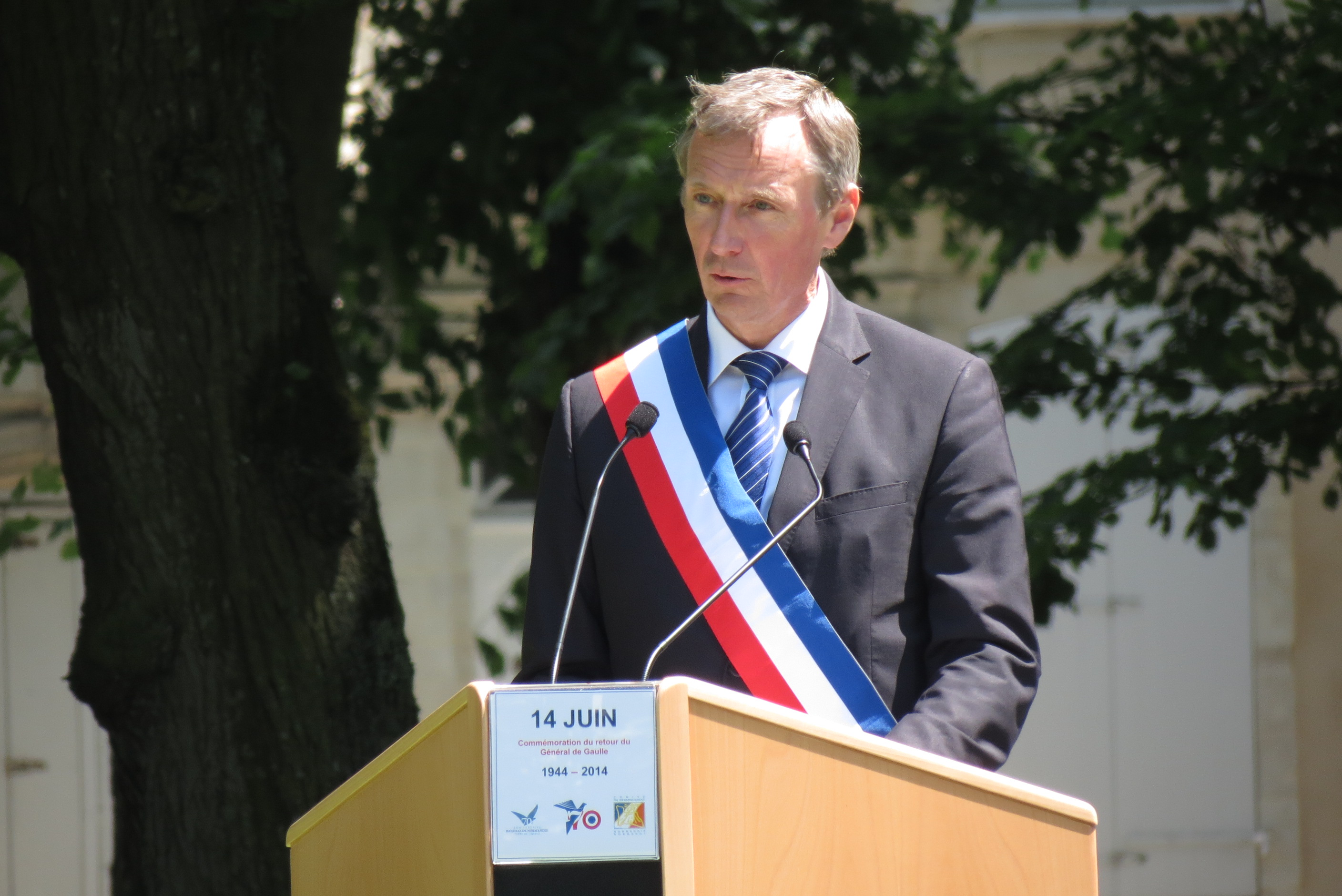 Patrick Gomont, maire de Bayeux, le 14 juin 2014.